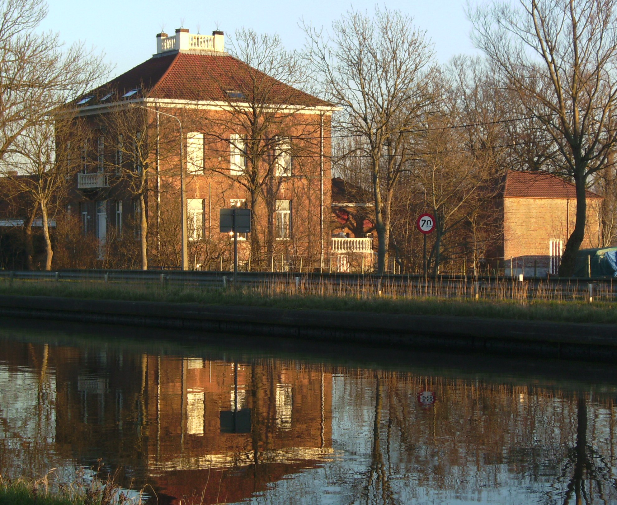 Le petit chateau Leffinge